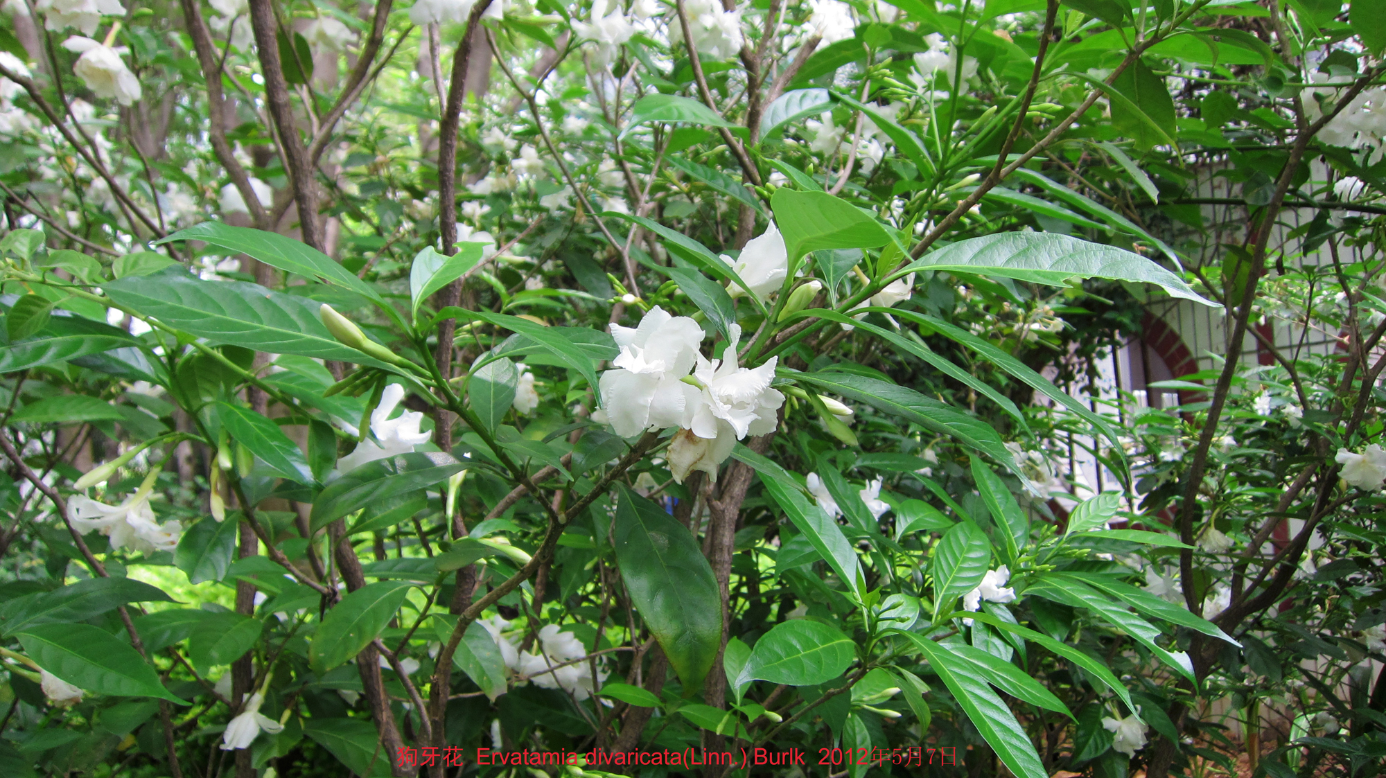 狗牙花Ervatamia divaricata(Linn.) Burlk